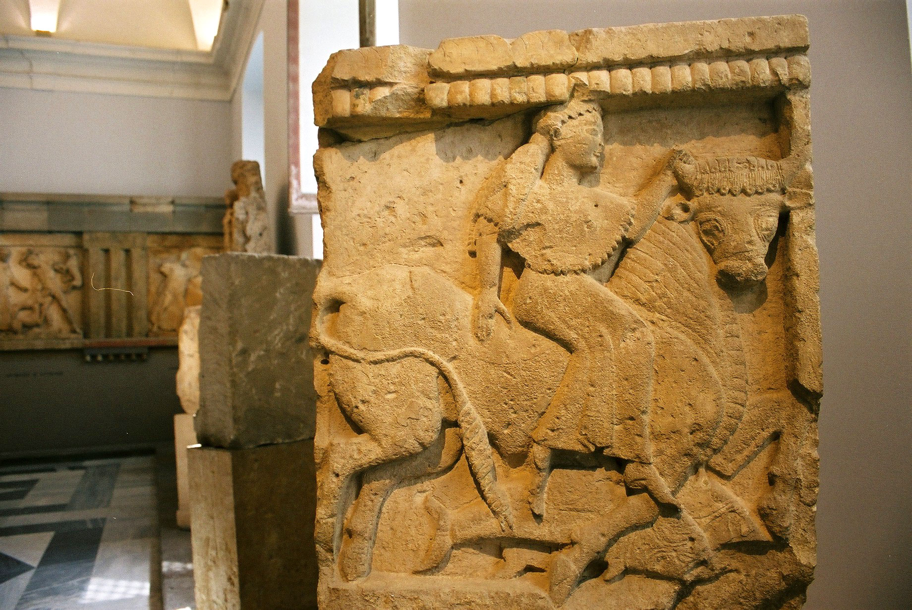 Museo Regionale Archeologico, Palermo. Archaic Metope from Selinunte.